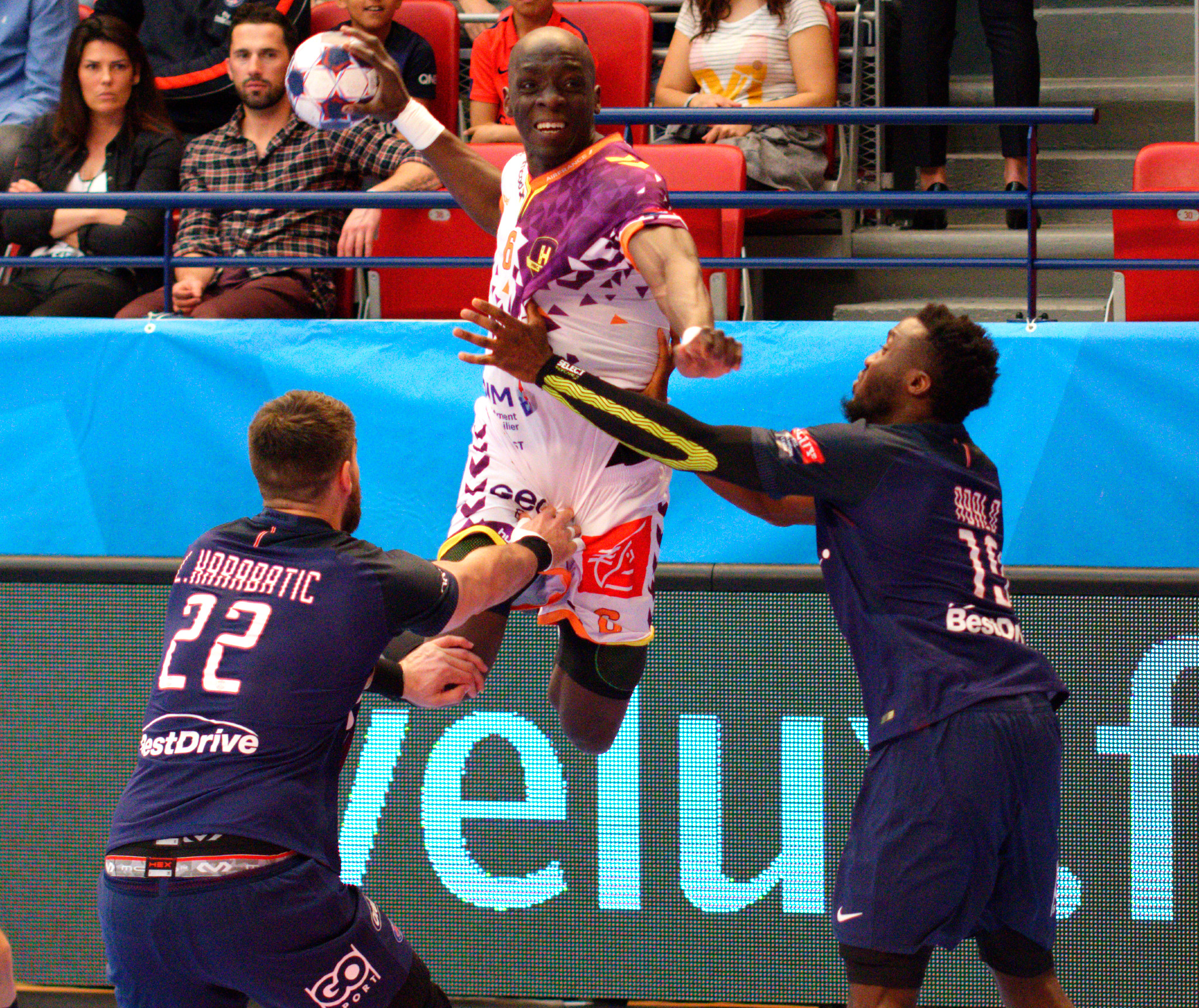 Huitième de finale de la ligue des champions 2016-17 entre le PSG et le HBC Nantes. A Coubertin, le 1er avril 2017.